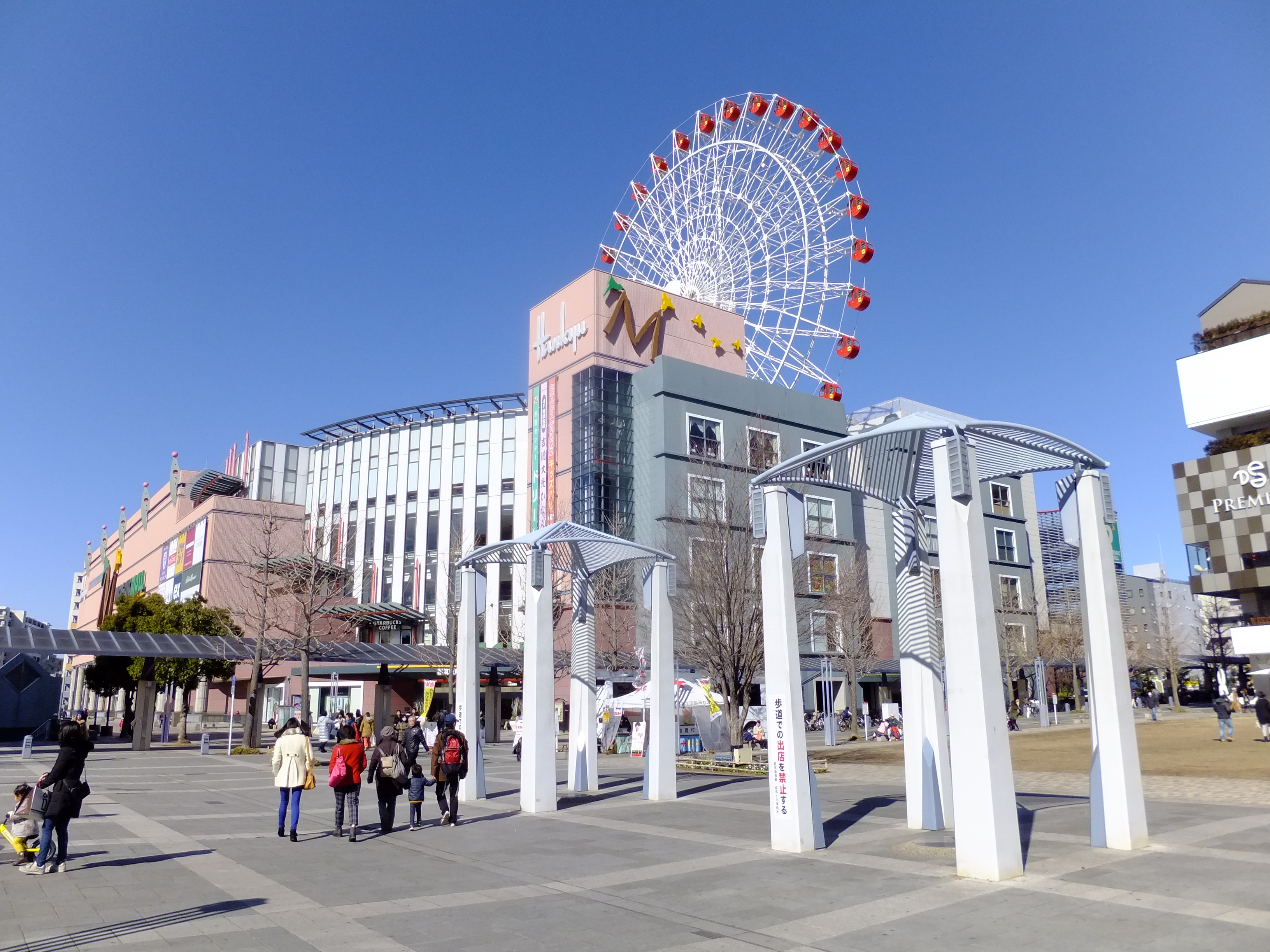 モザイクモール港北。阪急百貨店を核テナントとした大型商業施設である。